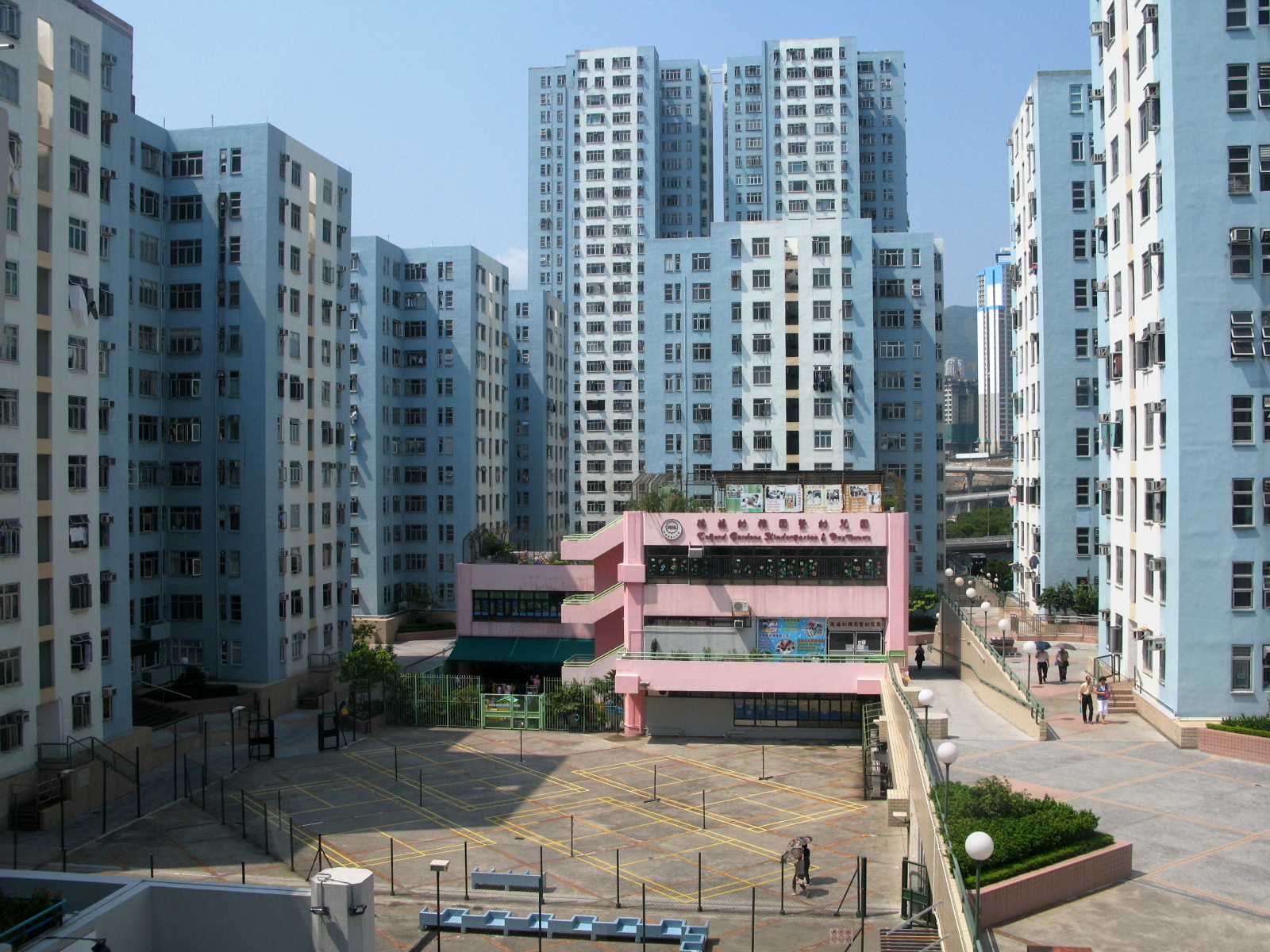 Telford Gardens Kindergarten 德福幼稚園